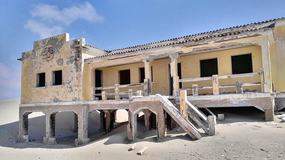 Ilha dos Tigres, ehemaliges Schulhaus (Grundschule mit zwei Klassenzimmern für je zwei Jahrgangsstufen und mit Standerhalterung)